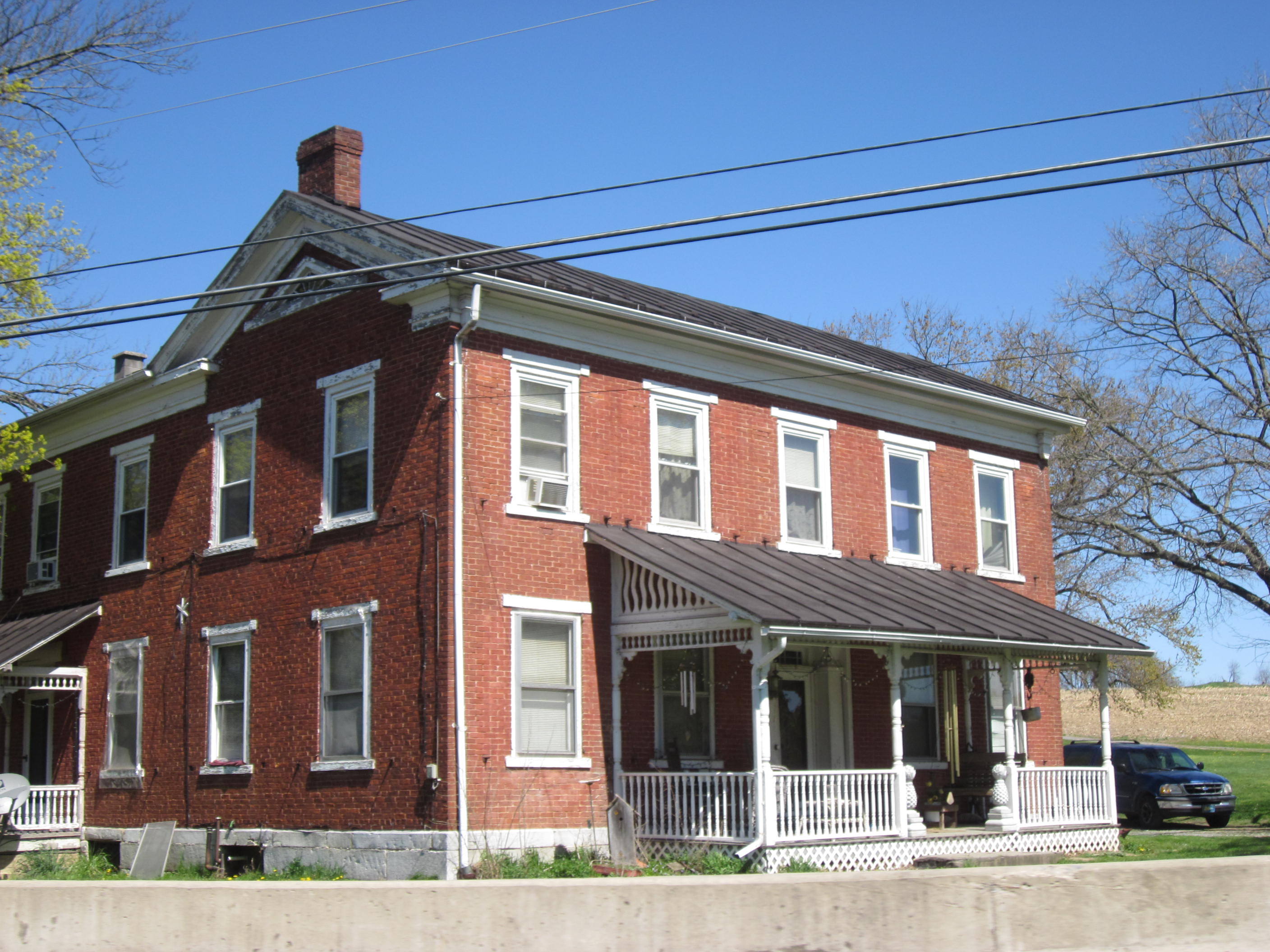 McEwensville, Pennsylvania